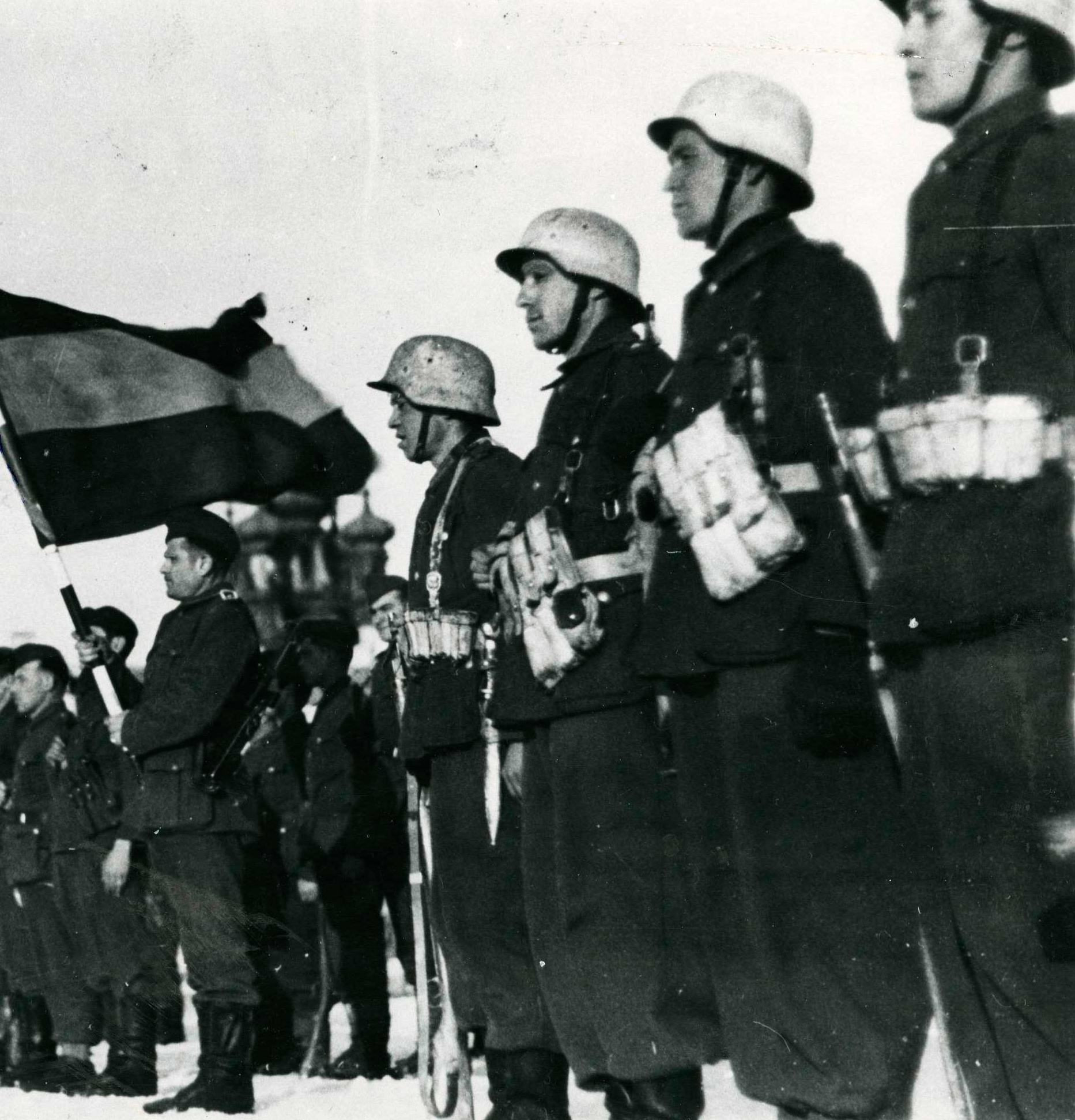 Fotografía tomada en el puesto de mando de Prokrowskaja, en Russia, durante la Segunda Guerra Mundial.